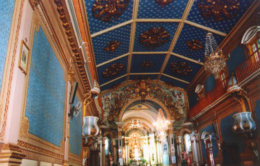 BoaMorte nave.jpg